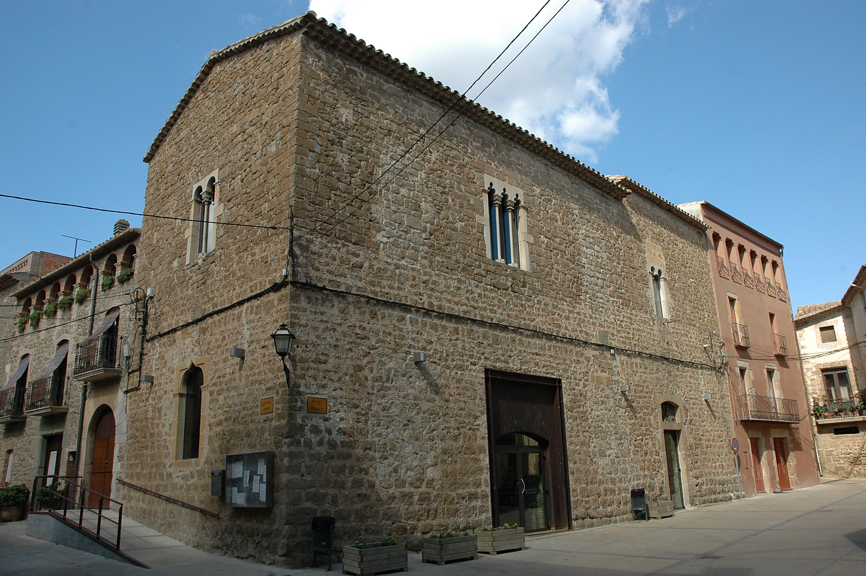 Castell de Rupià